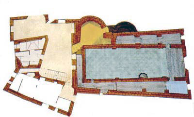 Plànol de l'església de Sant Esteve de Pallerols i l'antiga rectoria adjacent.